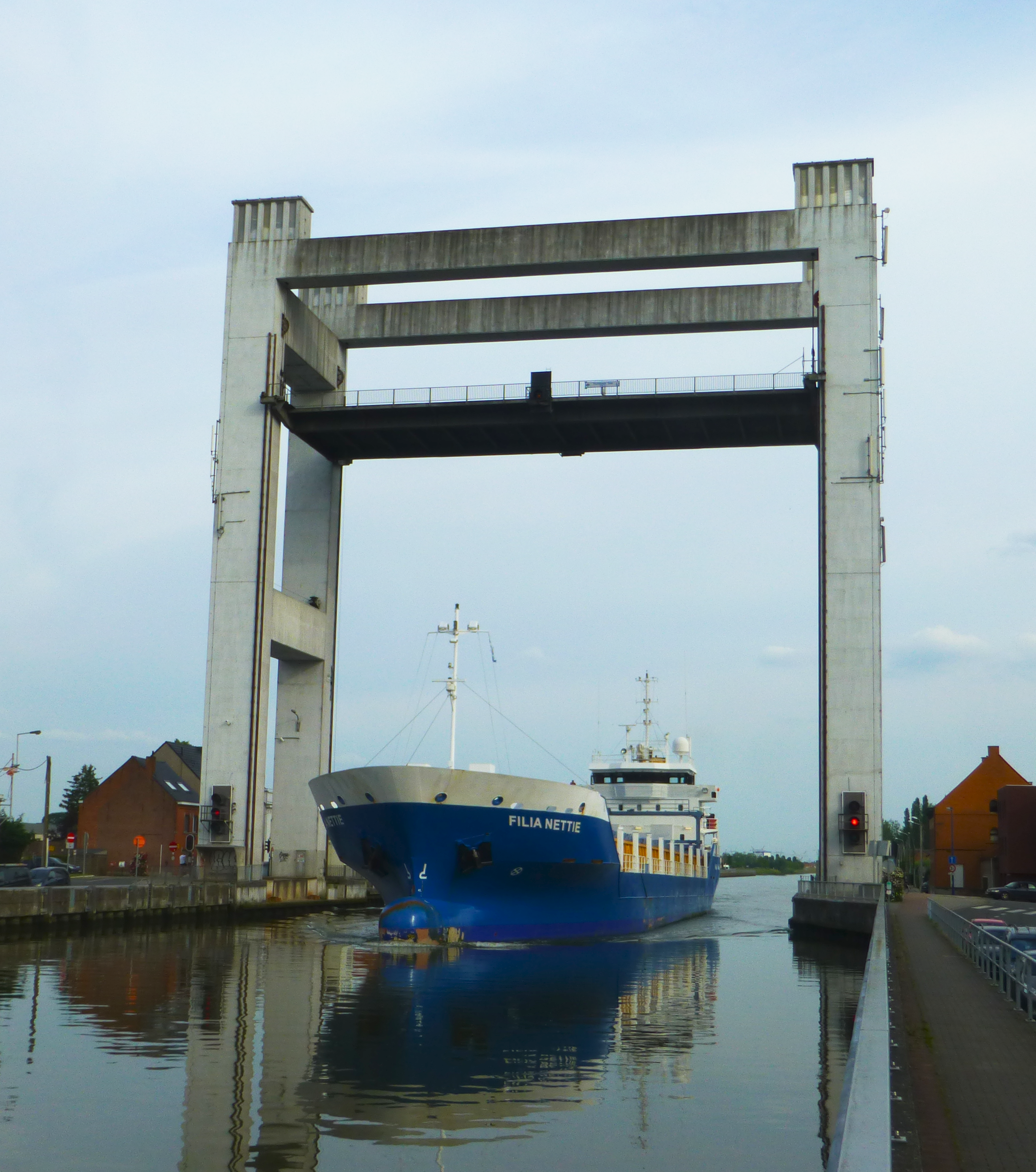 Humbeekbrug over het Zeekanaal Brussel-Schelde in Humbeek geopend voor een zeeschip